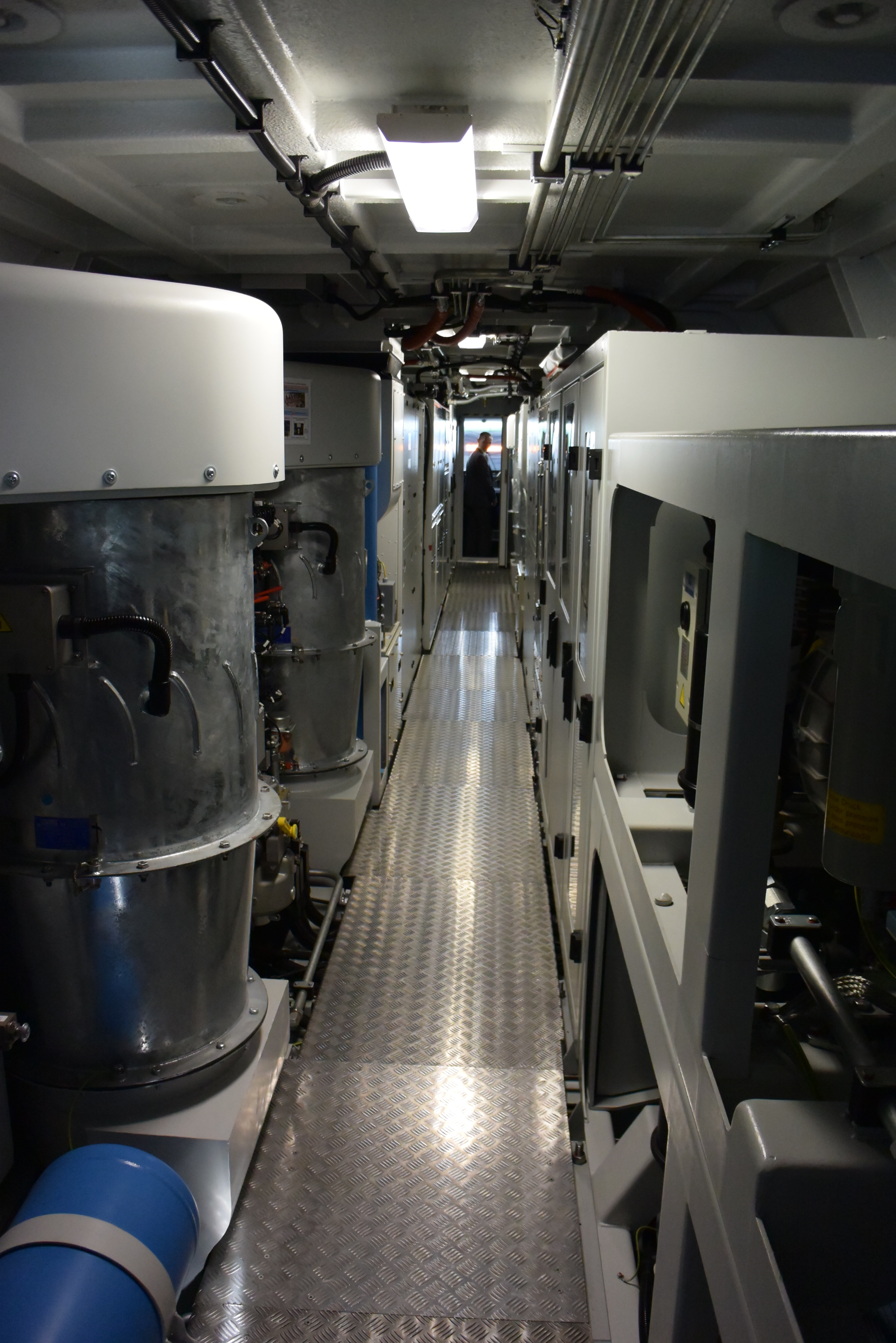 Przedział maszynowy Newag Dragon podczas InnoTrans 2014